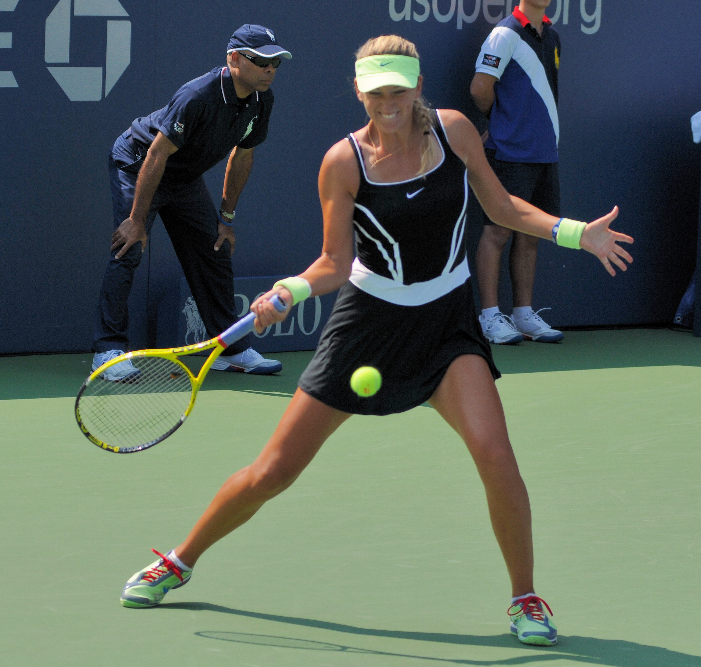 Victoria Azarenka - US Open 2010